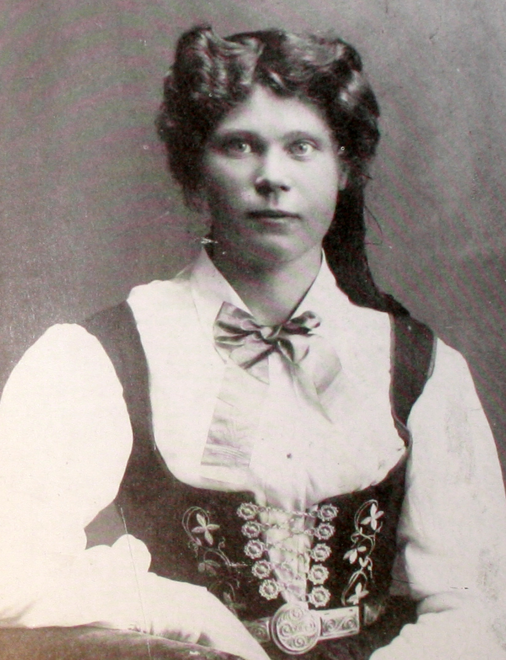 Sigrún Sigurhjartardóttir á yngri árum